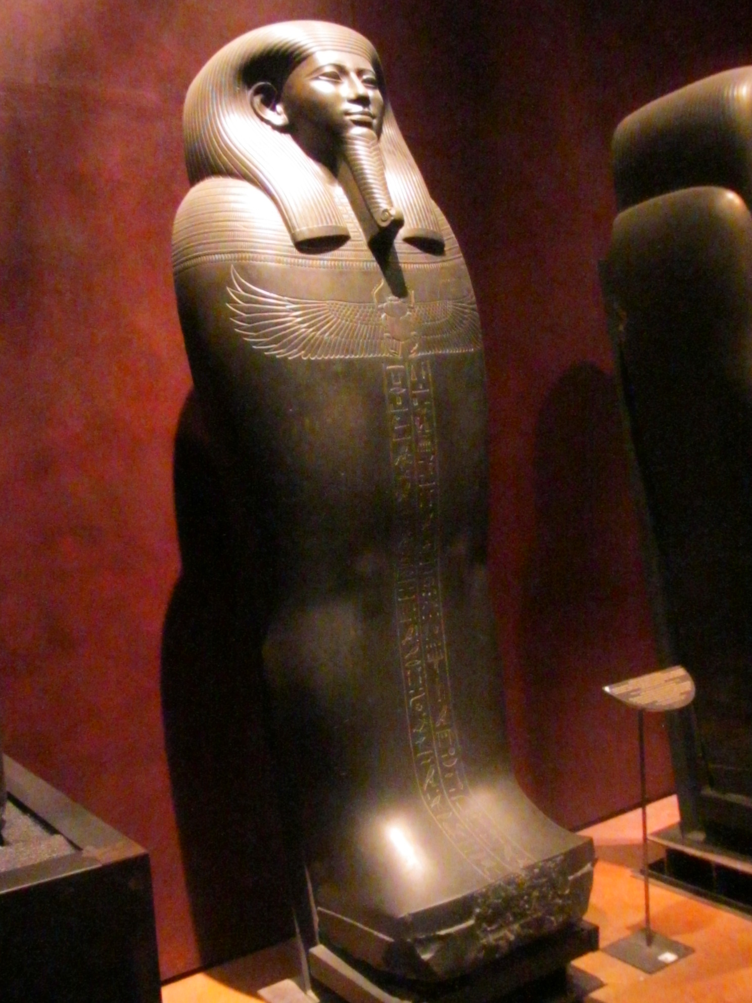 Sarcofago in pietra al Museo Egizio di Torino - ( Parte 2 del Museo)